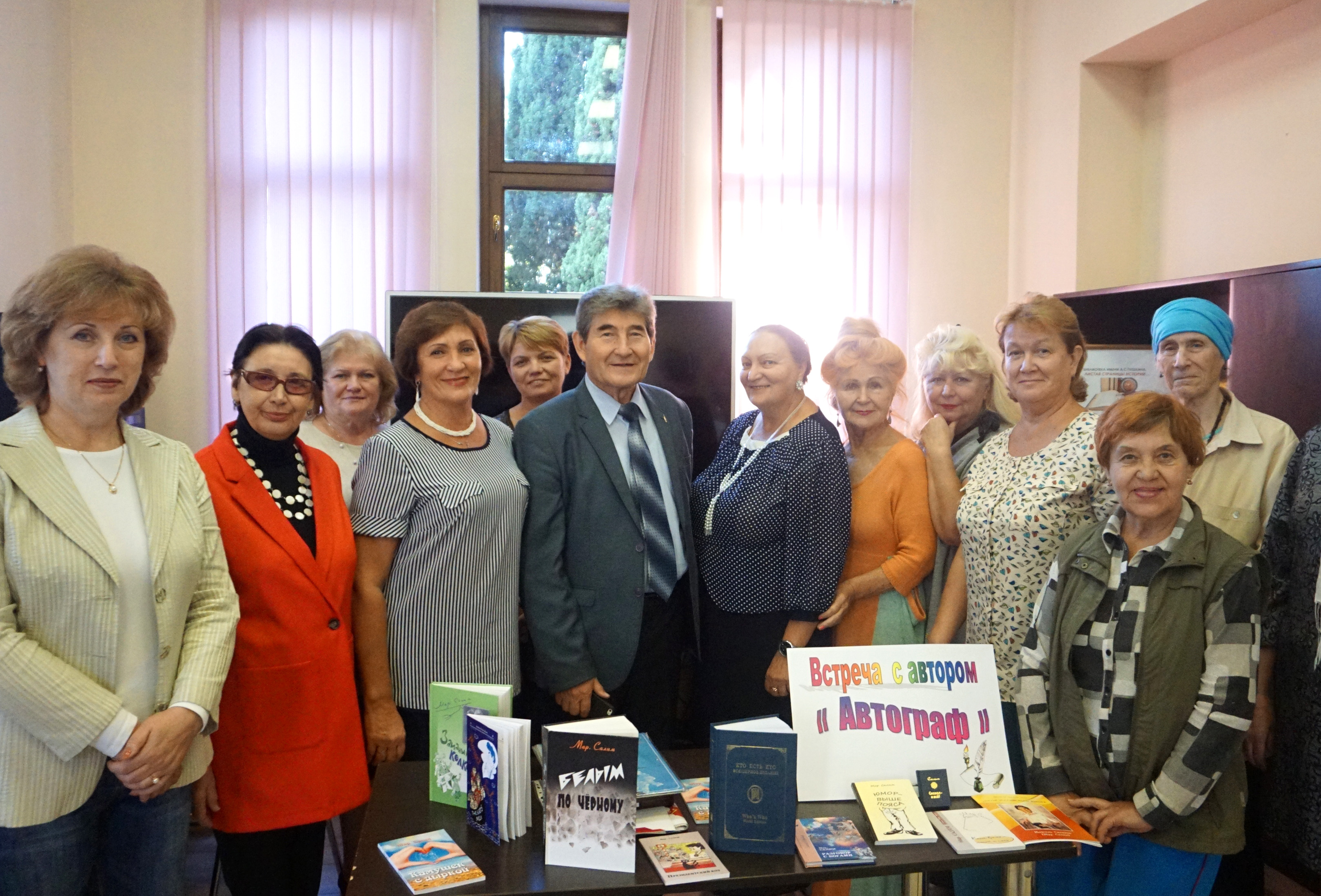 Марсель Шайнурович Салимов (псевдоним Мар. Салим; род. 3 января 1949 года) — писатель-сатирик, поэт, публицист, переводчик. Заслуженный работник культуры Башкирской ССР (1990) и Российской Федерации (1993). Член Союза писателей России и РБ. Встреча с писателем в библиотеке имени А.С. Пушкина (Сочи, 8 сентября 2018 г.).